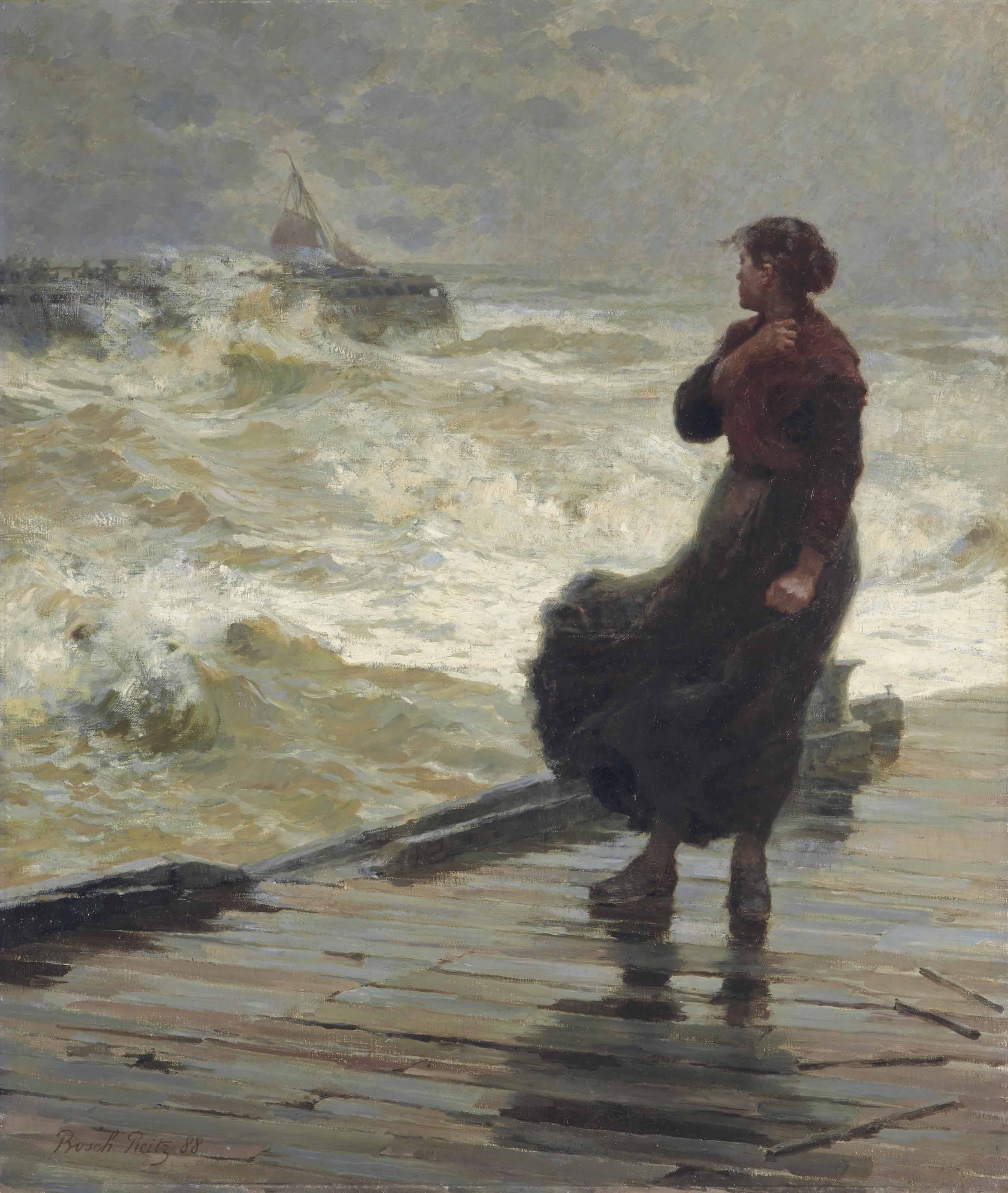 La Rentrée périlleuse